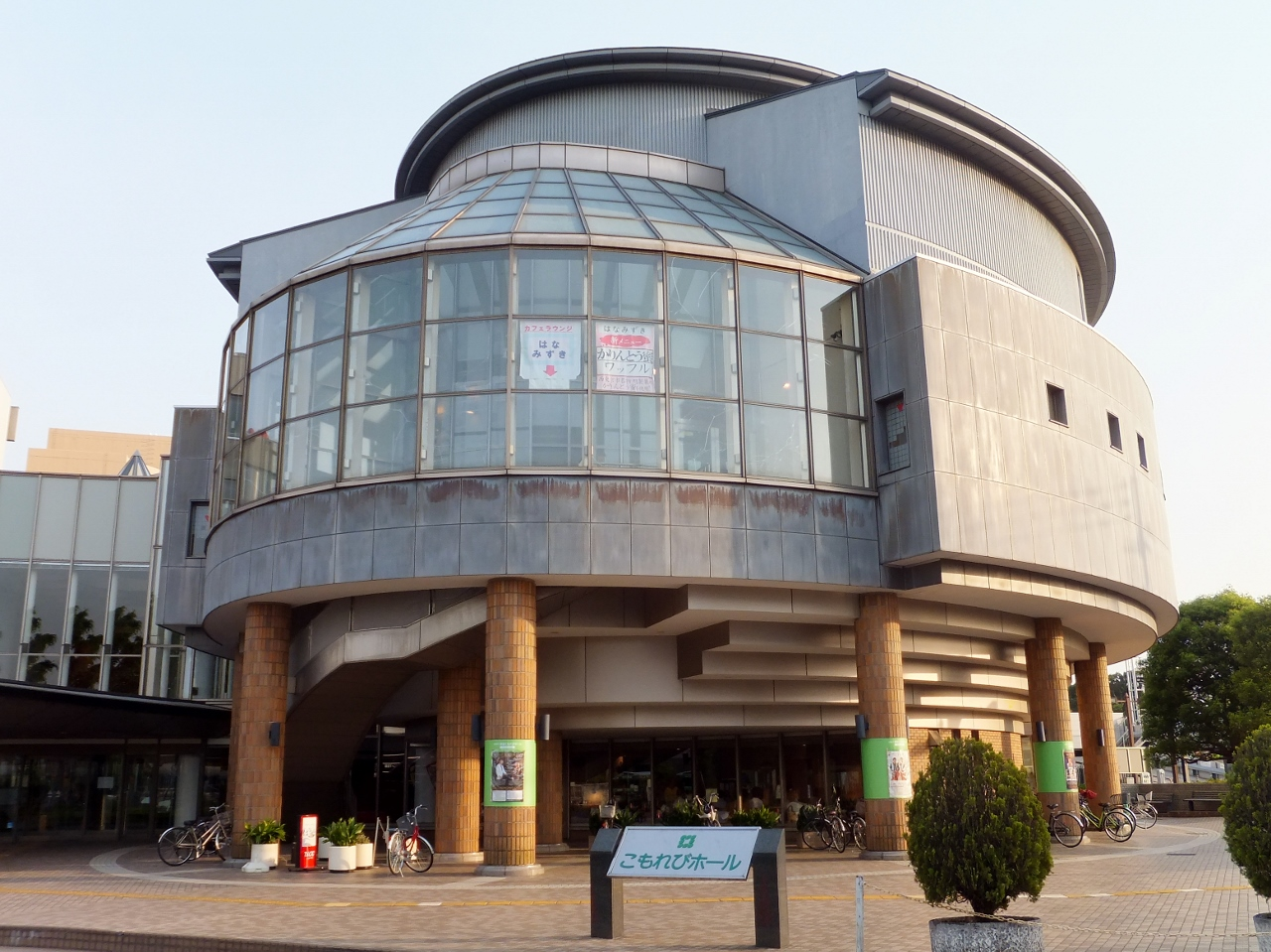 こもれびホール（外観） 2016年5月14日撮影